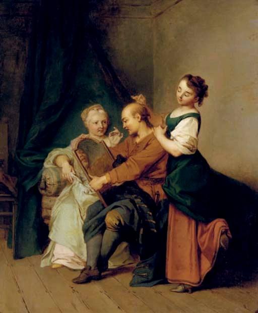 L'homme entre deux ages et deux maîtresses